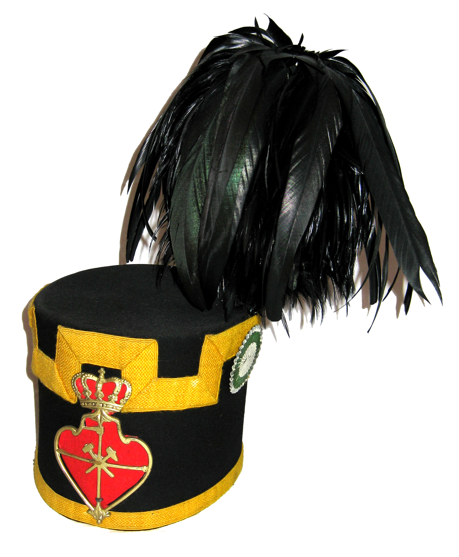 Paradehut für Krankenkassenmitglieder 3. Klasse am Königlichen Steinkohlenwerk Zauckerode